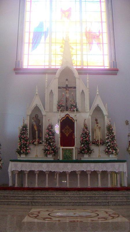 Altar-mor da "Igreja de Bom Jesus Crucificado e do Imaculado Coração de Maria", em Bom Jesus do Itabapoana, no estado do Rio de Janeiro, no Brasil. Pertencente à Administração Apostólica Pessoal São João Maria Vianney.